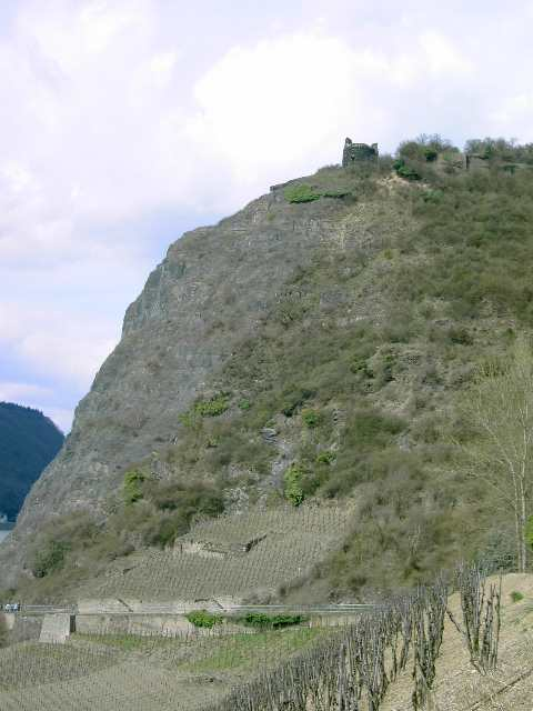 Hammersteiner Lay mit Burgruine Hammerstein